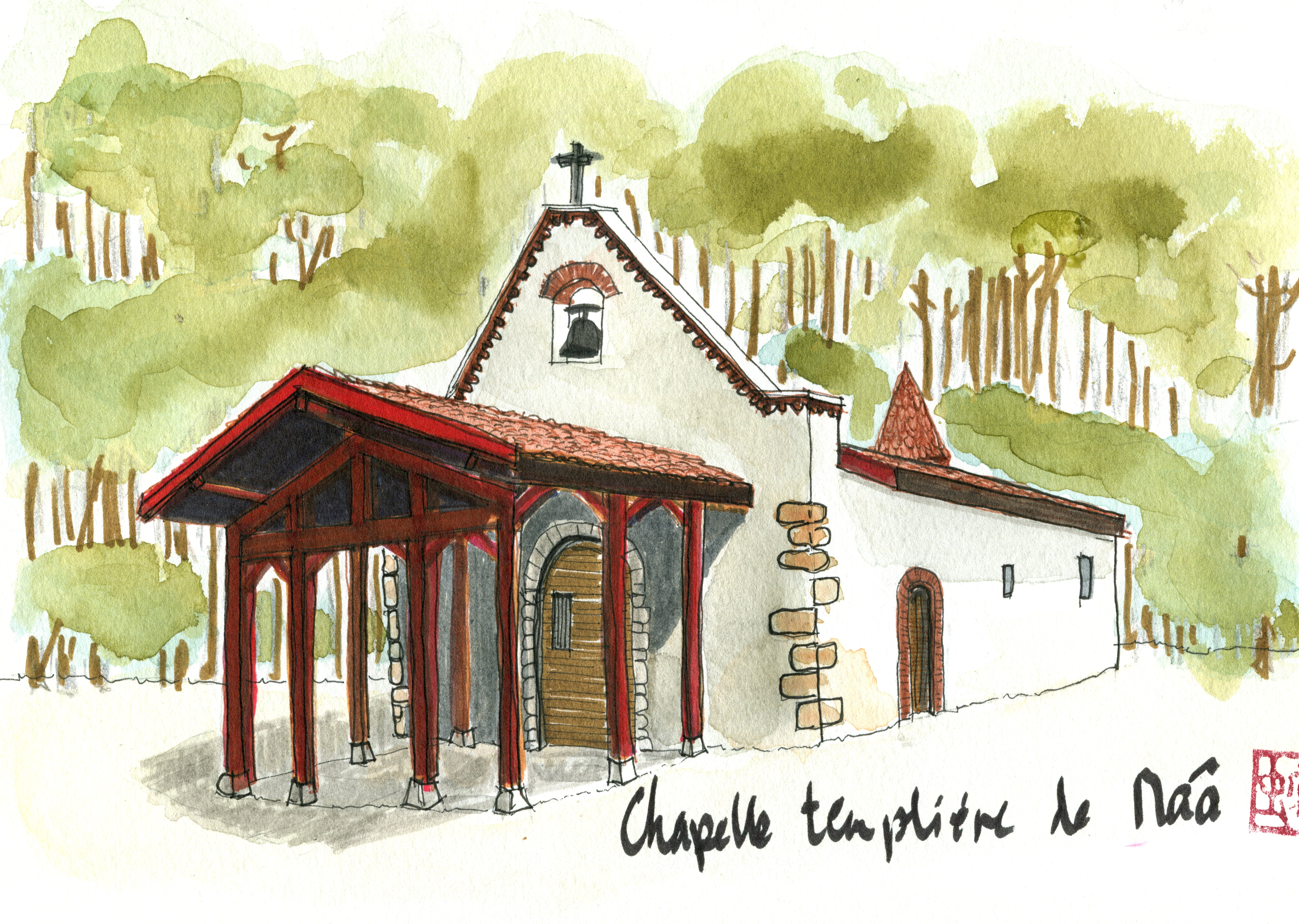 Aquarelle de la chapelle Saint-Laurent, à Maâ, Moliets-et-Maâ dans le département français des Landes.